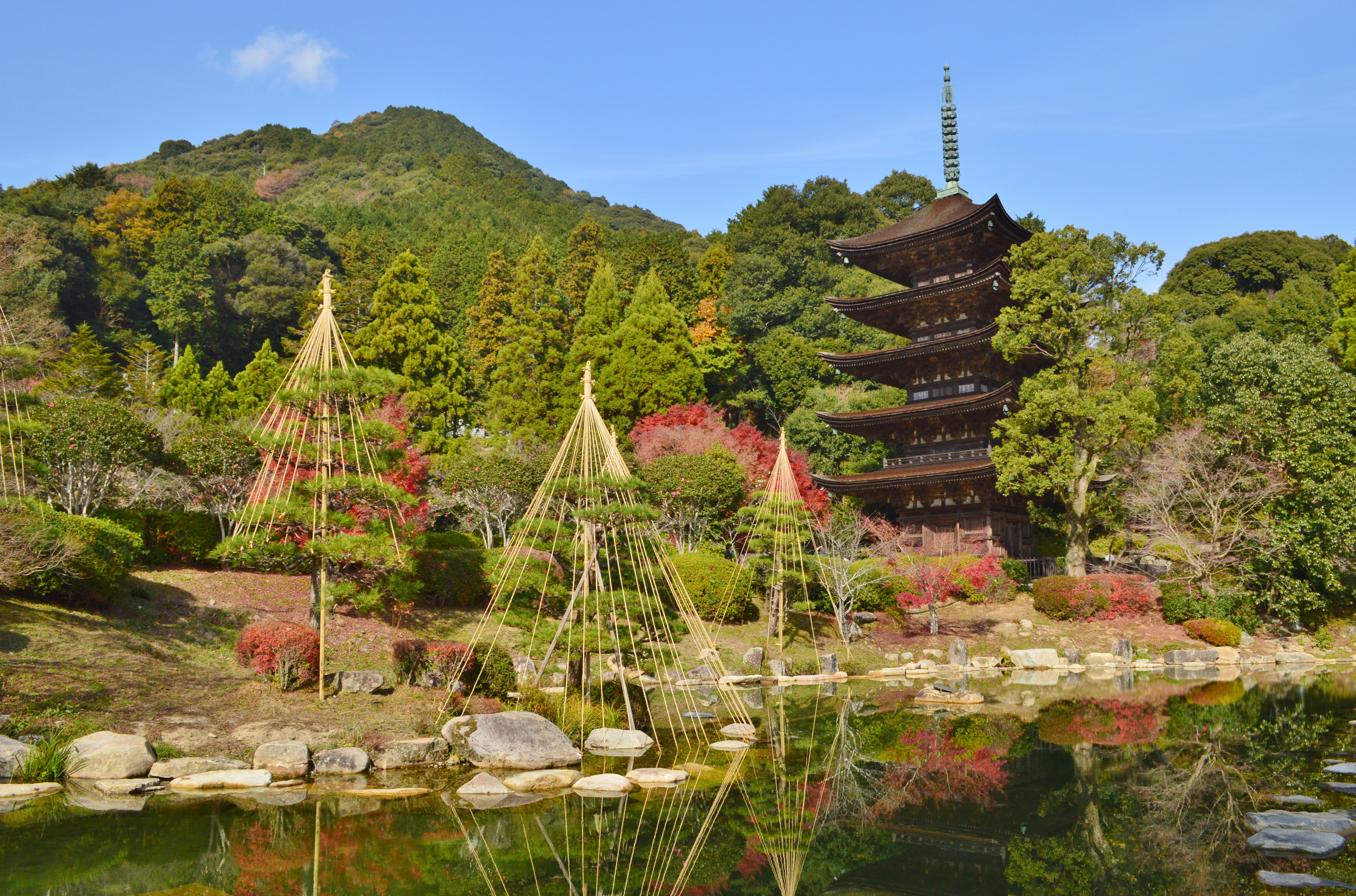 瑠璃光寺 (山口市) 五重塔と池